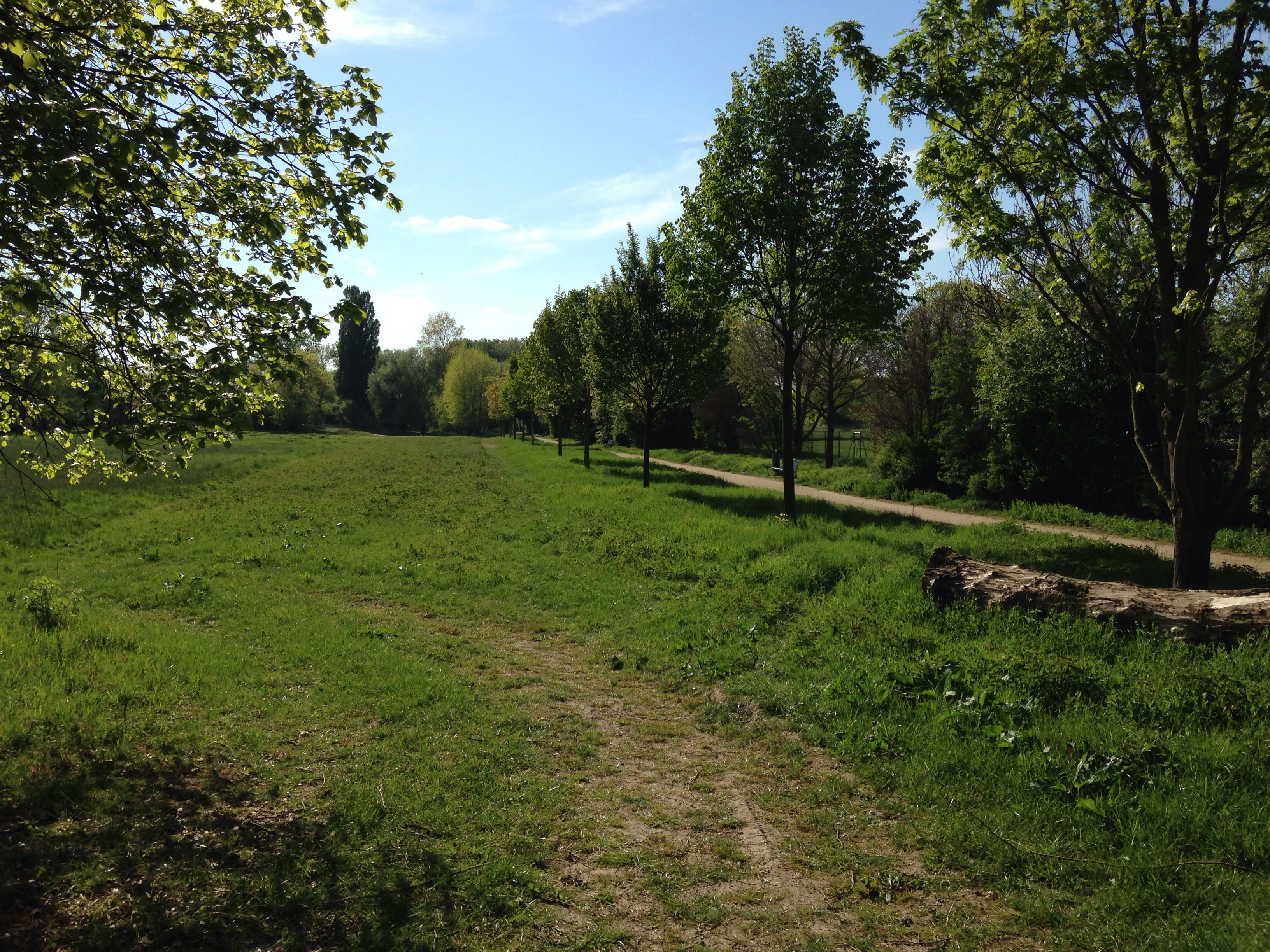 Bürgerpark Gustavsburg